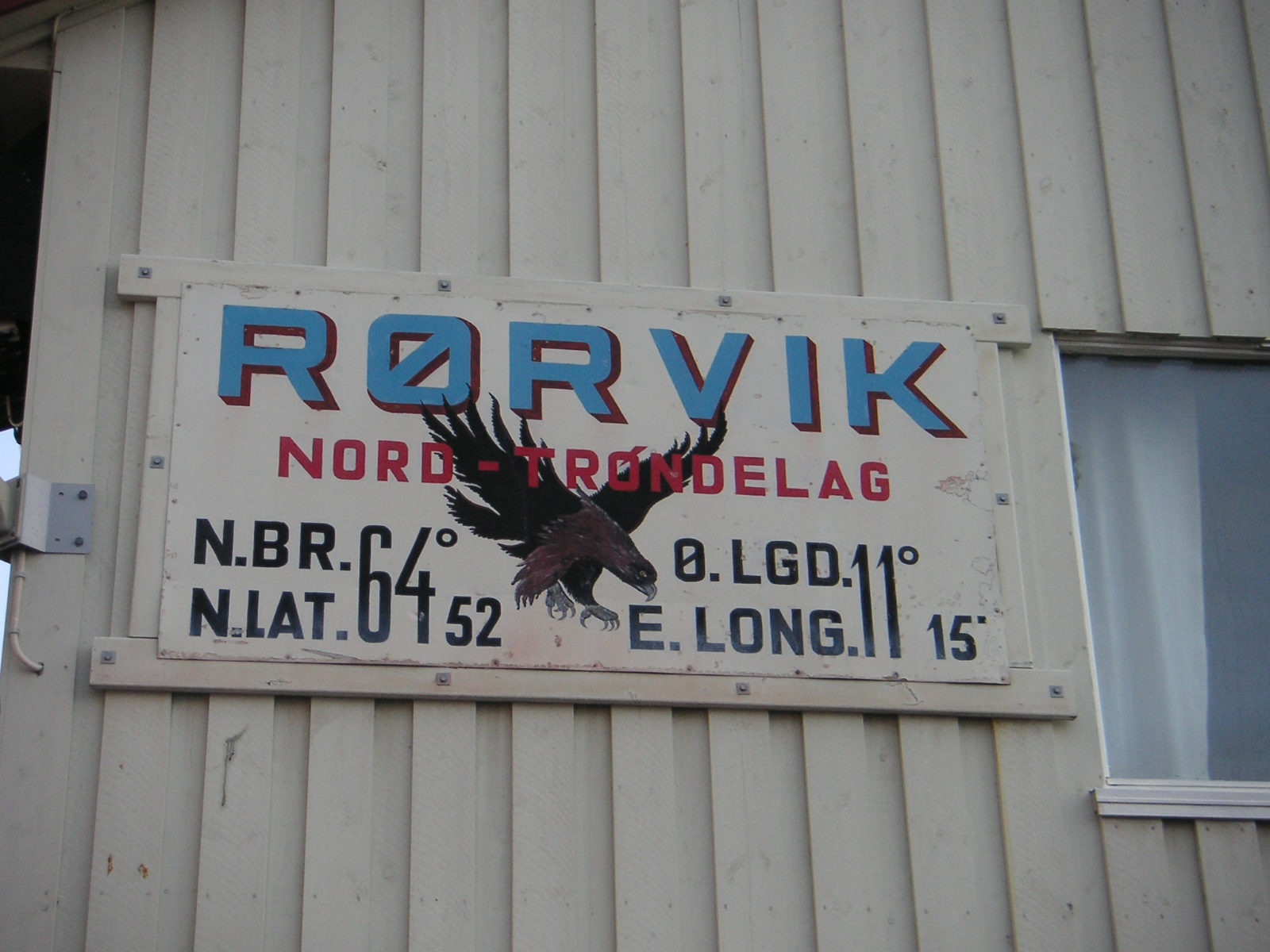 Am Kai von Rørvik